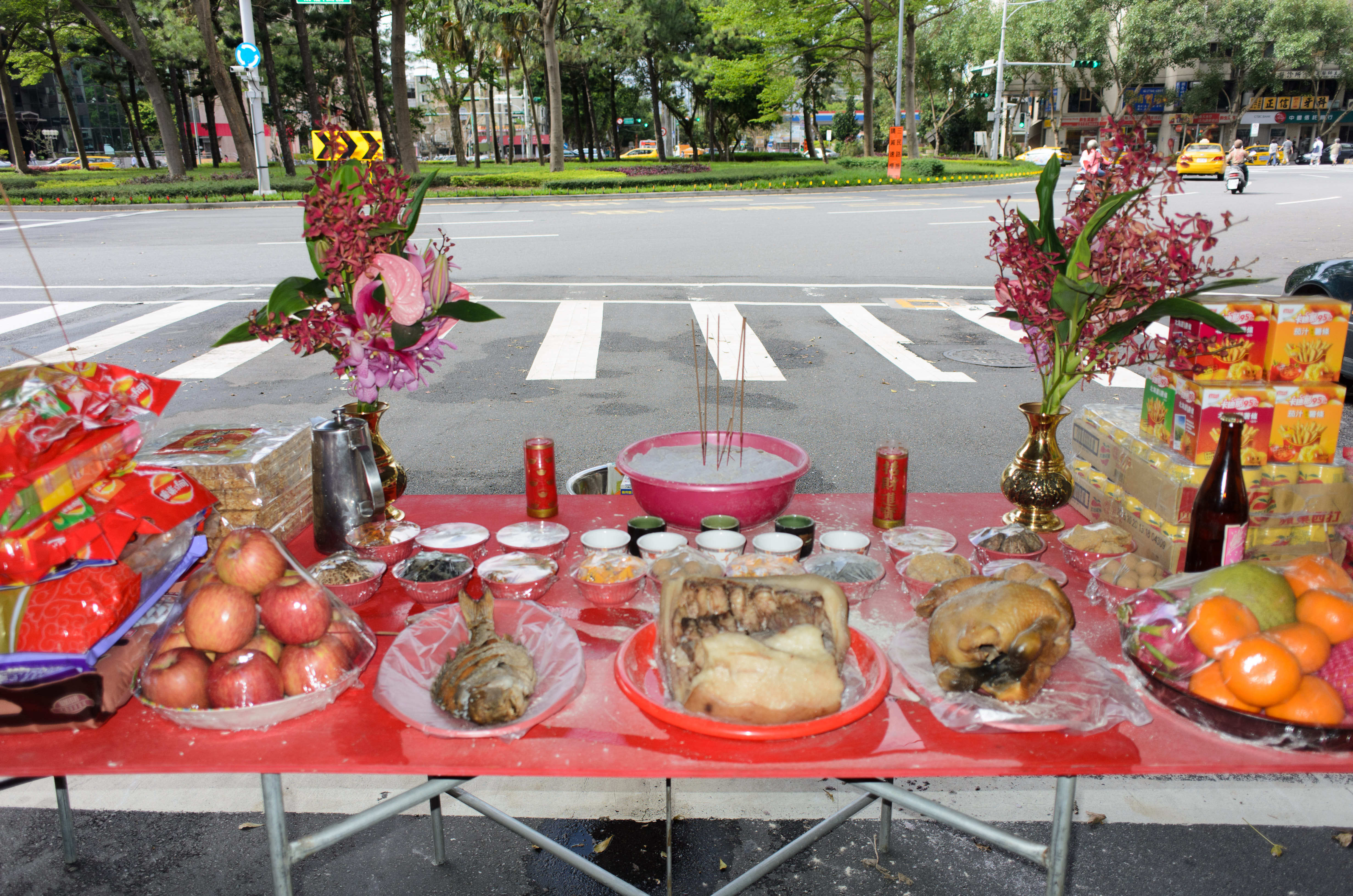 臺北市松山區富泰里2015年中元普渡法會，會場最前方的主祭桌，擺設香盆、三牲、素果、淨茶等。